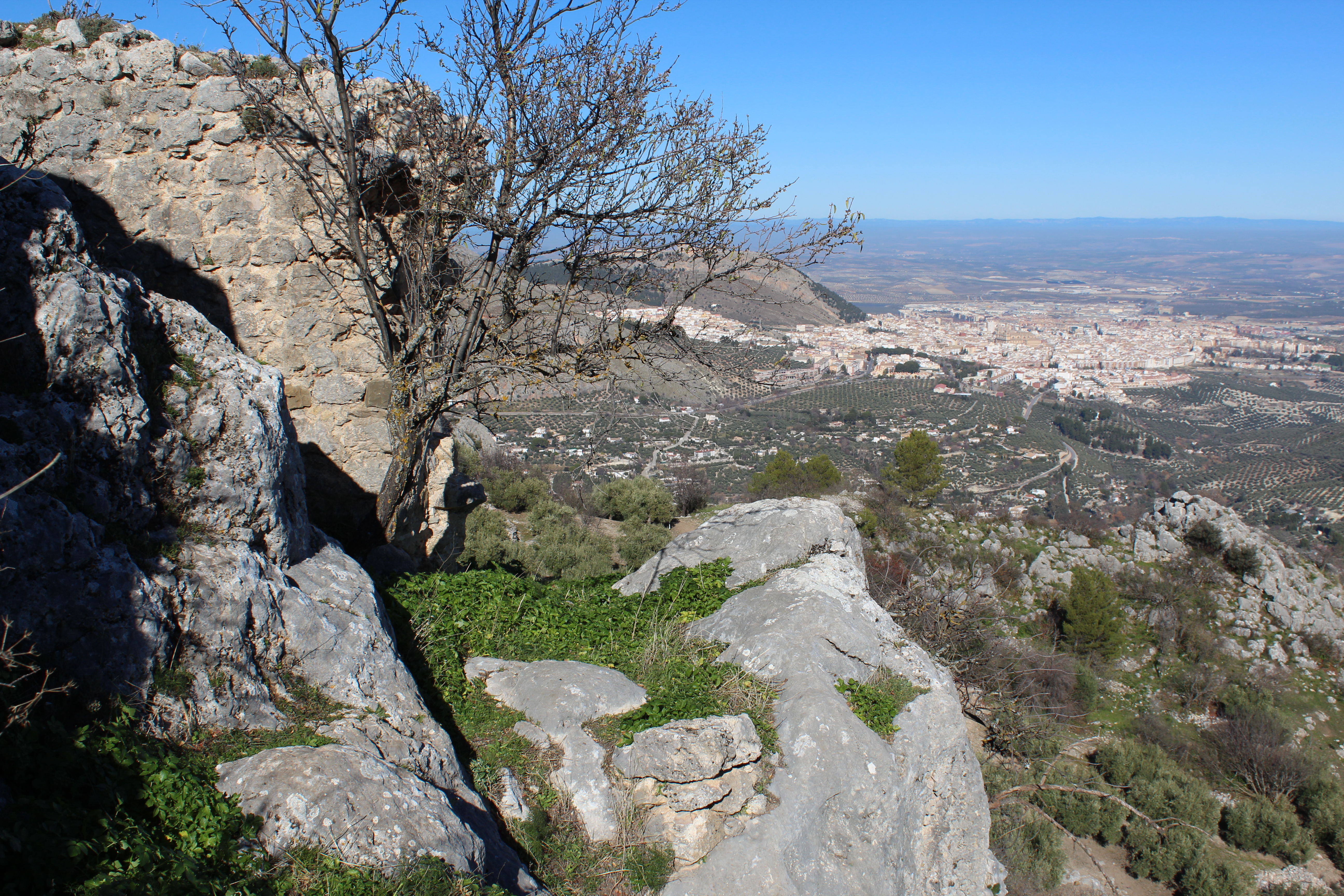 Restos de murallas del Castillo de las Peñas de Castro y ciudad de Jaén al fondo.